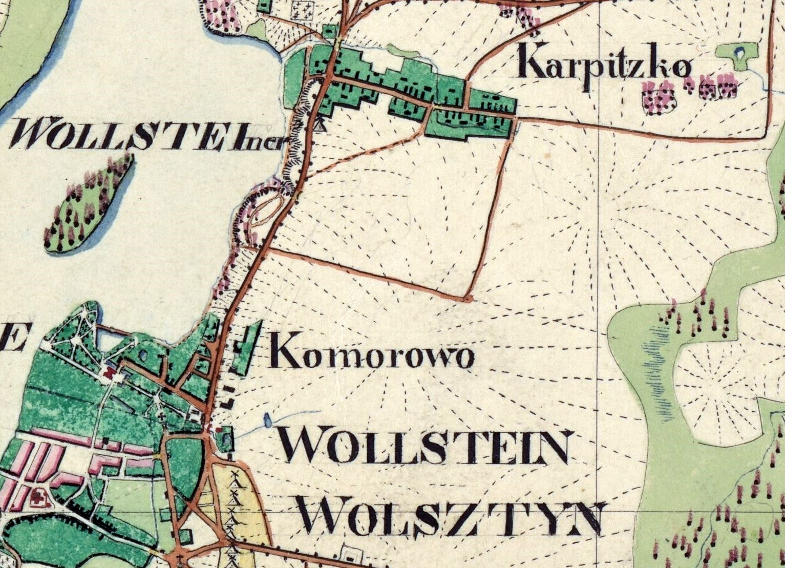 Wycinek arkusza mapy Preußisches Urmeßtischblatt przedstawiający rozbudowę Karpicka w roku 1828.